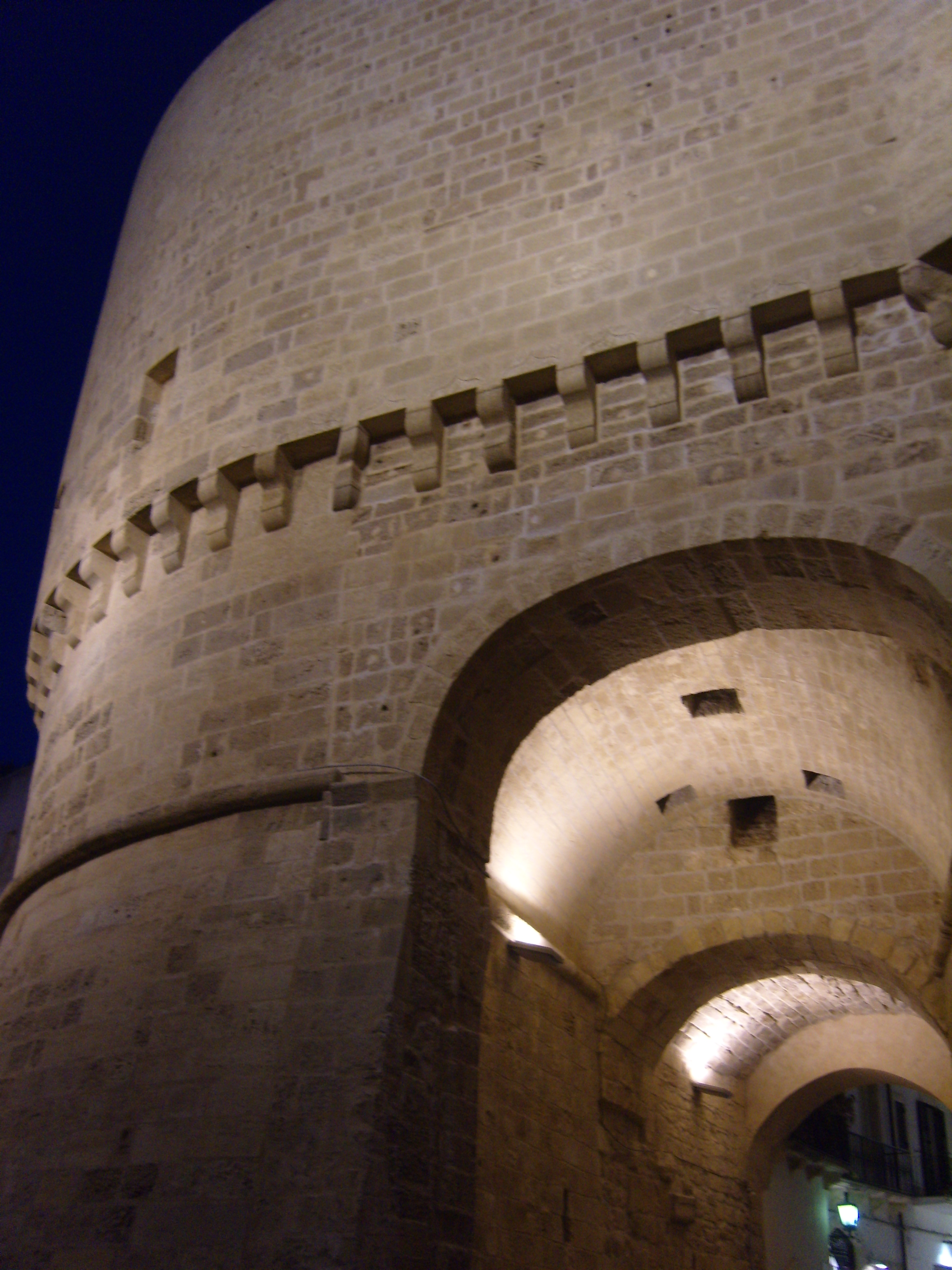 Otranto's castle